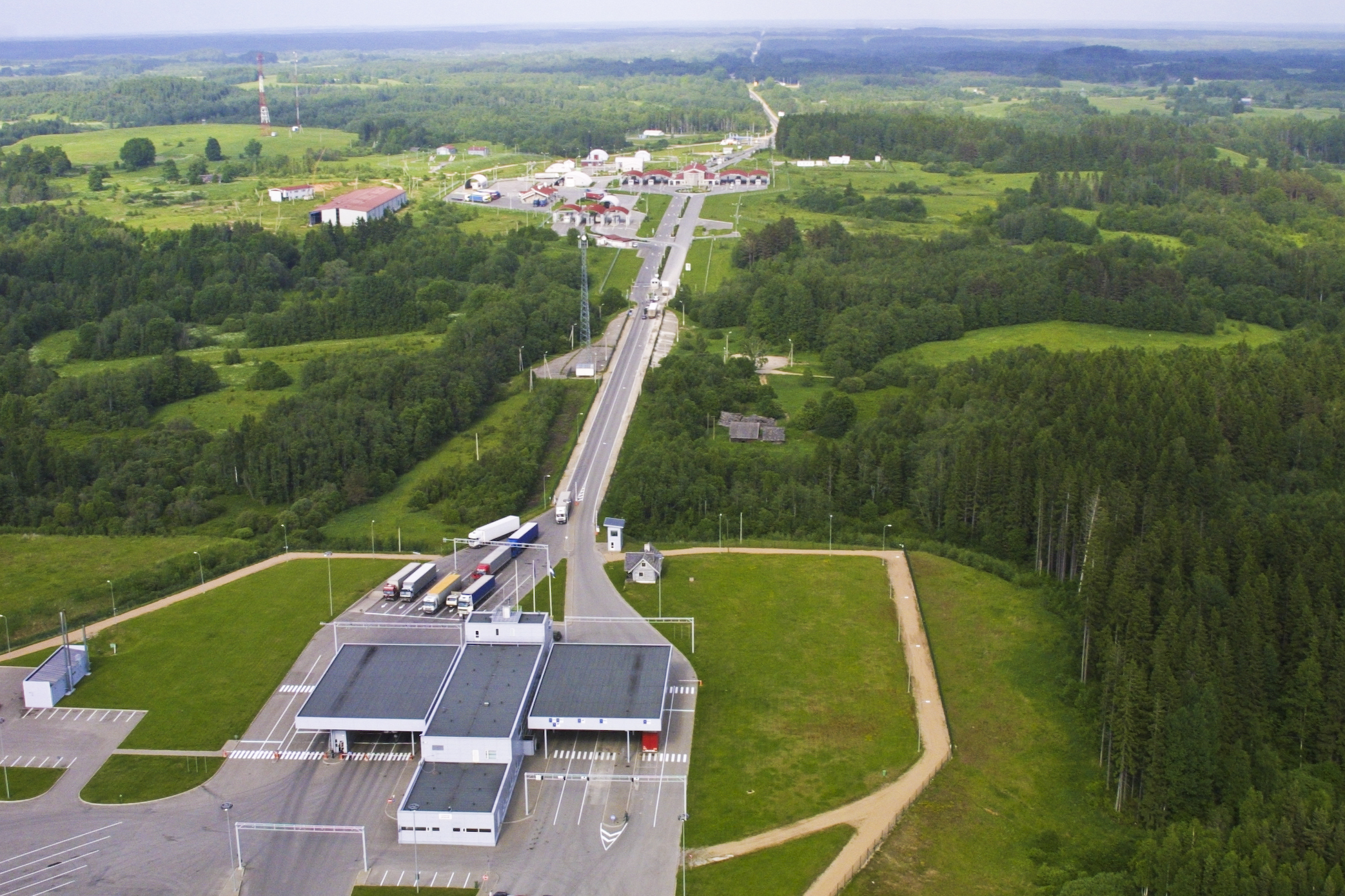 Luhamaa piiripunkt 2005. aastal.